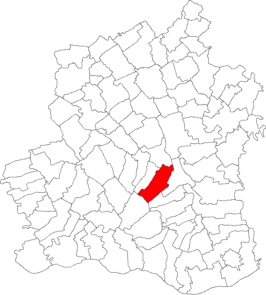 Categorie:Hărţi ale judeţului Teleorman